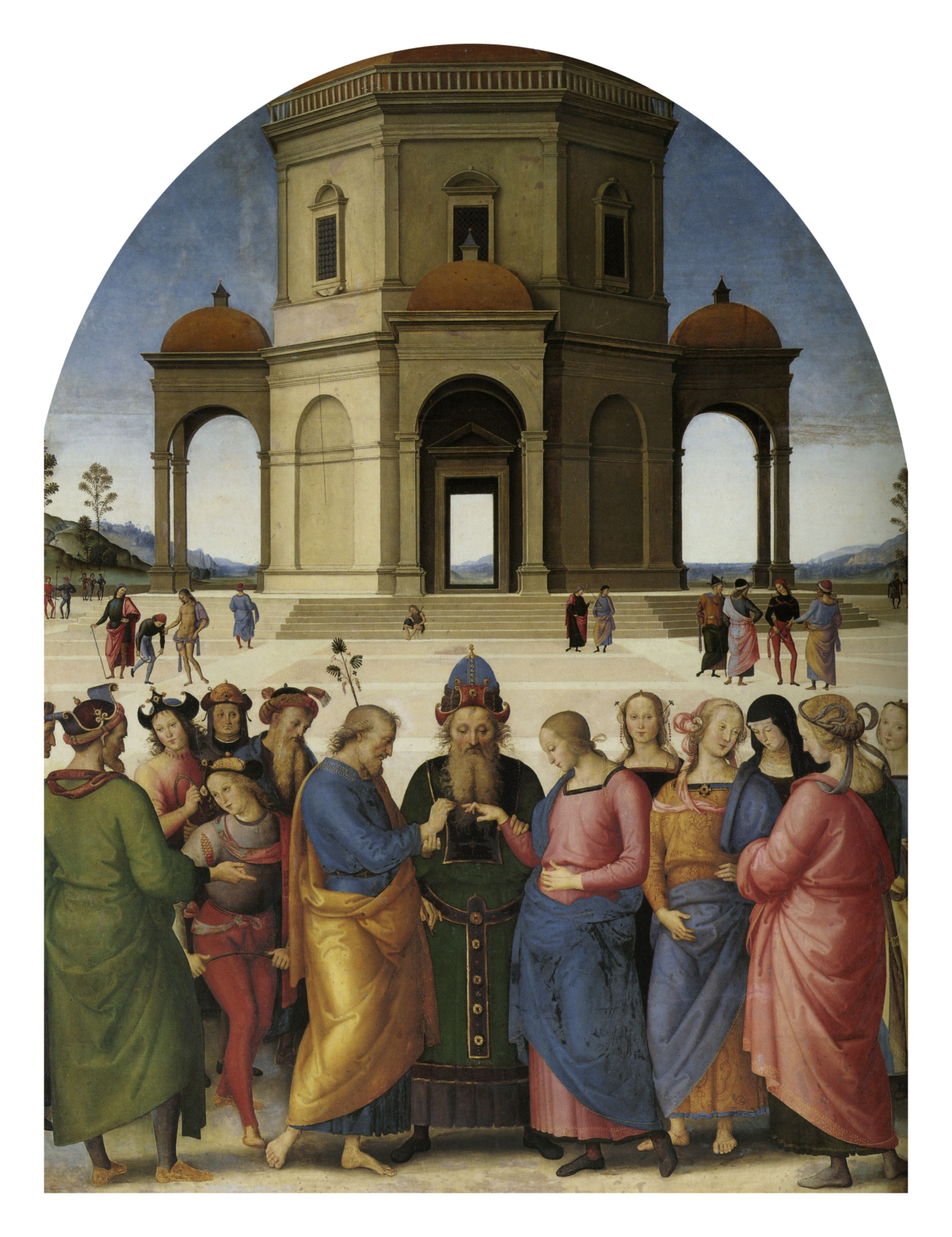 Cat. no. 66 in Vittoria Garibaldi: Perugino. Catalogo completo. Octavo, Firenze 2000, ISBN 88-8030-091-1